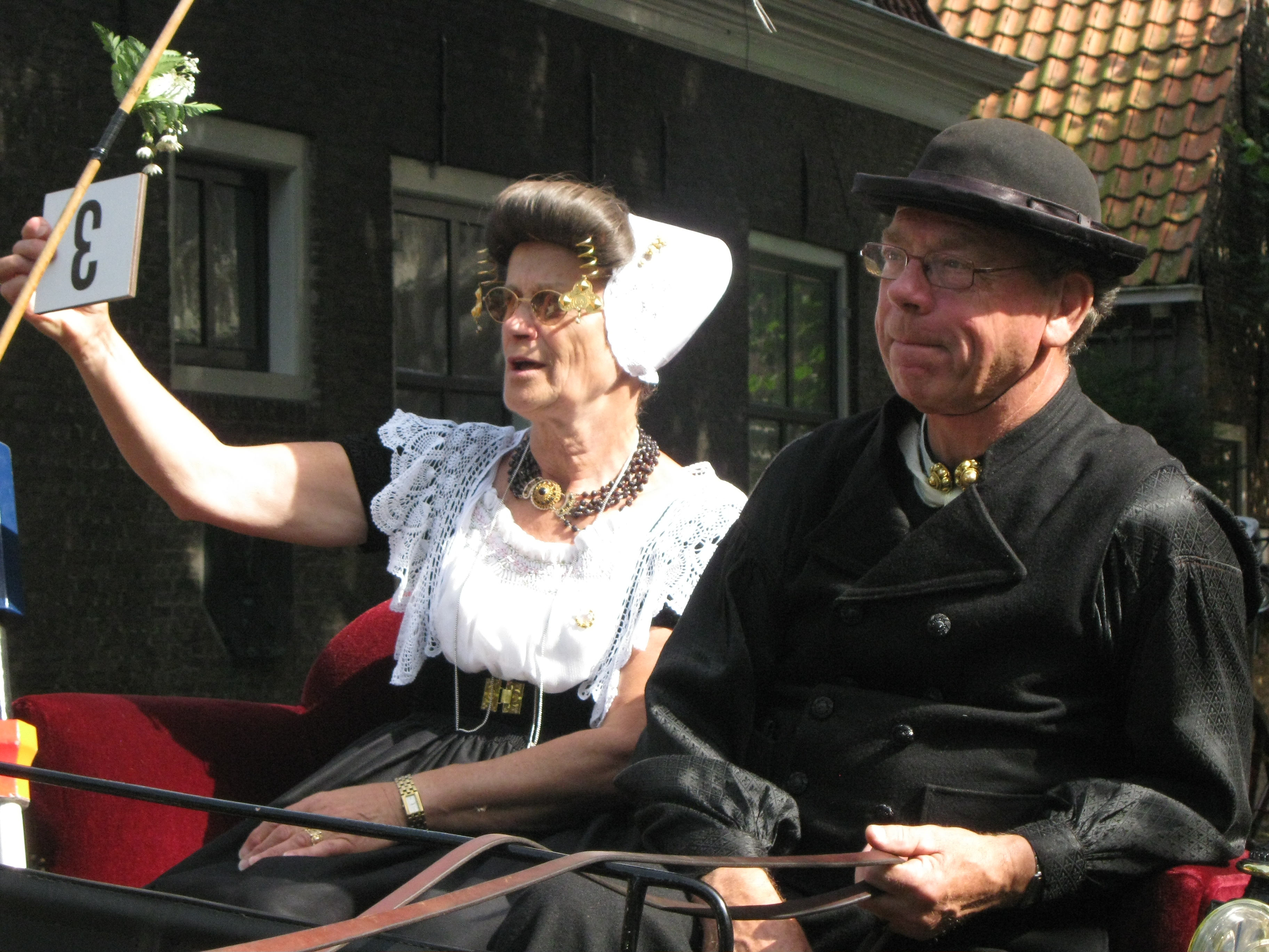 Ringrijden in Kloetinge / Zeeland